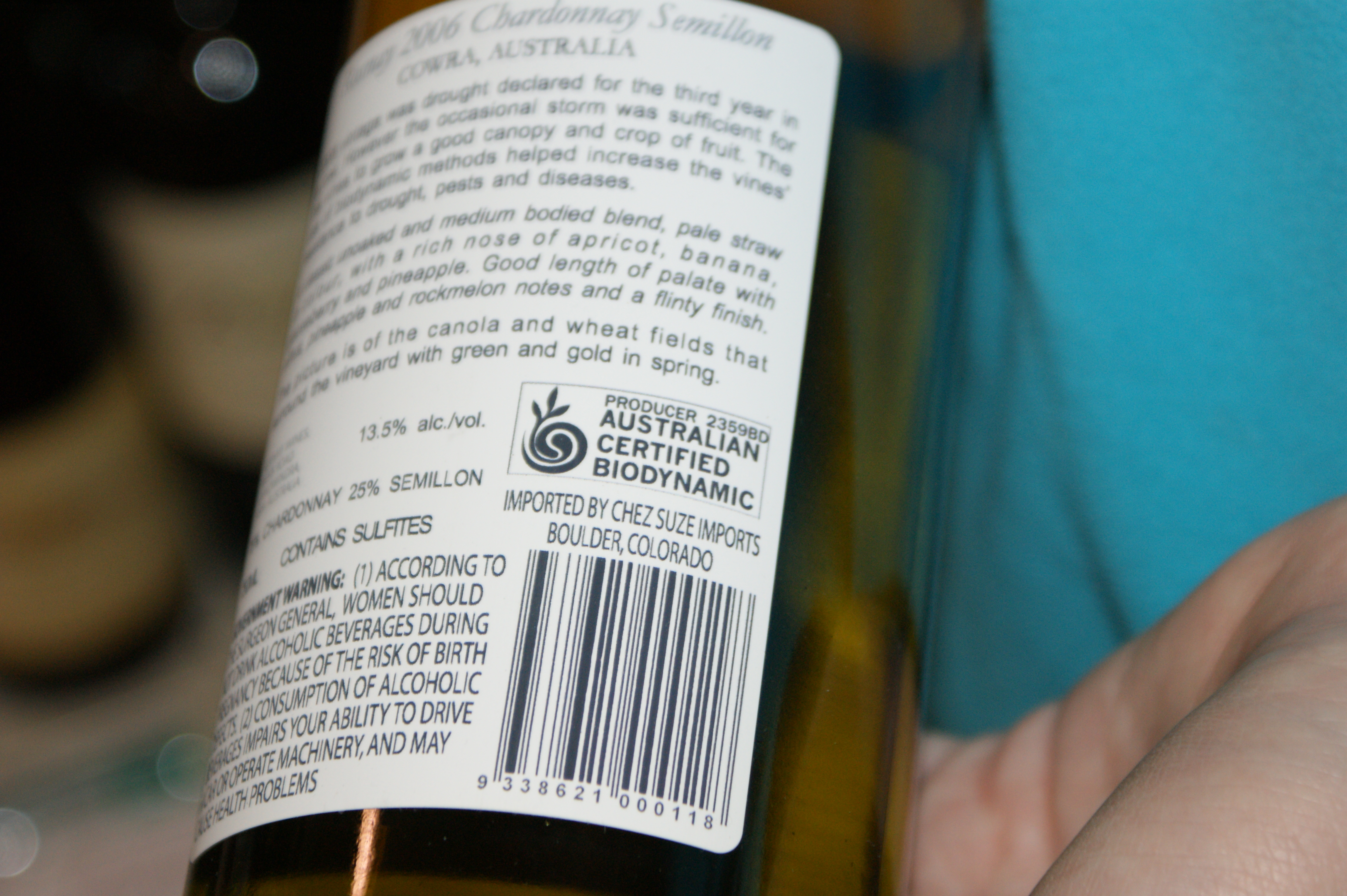 Bouteille notifiée Australian certified biodynamic